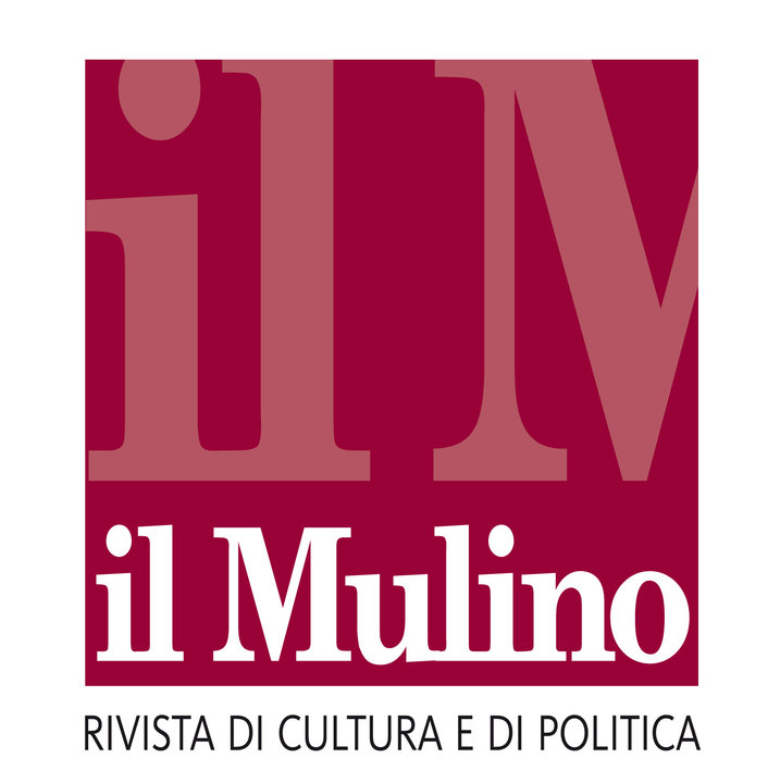 Logo il Mulino (rivista)